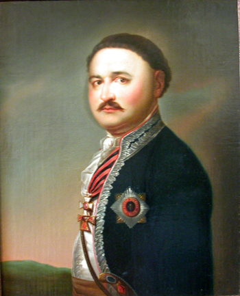 Василий Петрович Орлов (1745—1801)